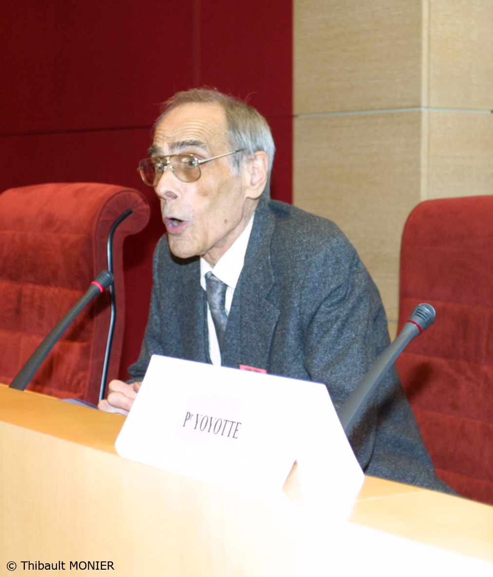 Conférence de Jean Yoyotte à l'Académie Nationale de chirurgie-Dentaire. le 17/03/2003.